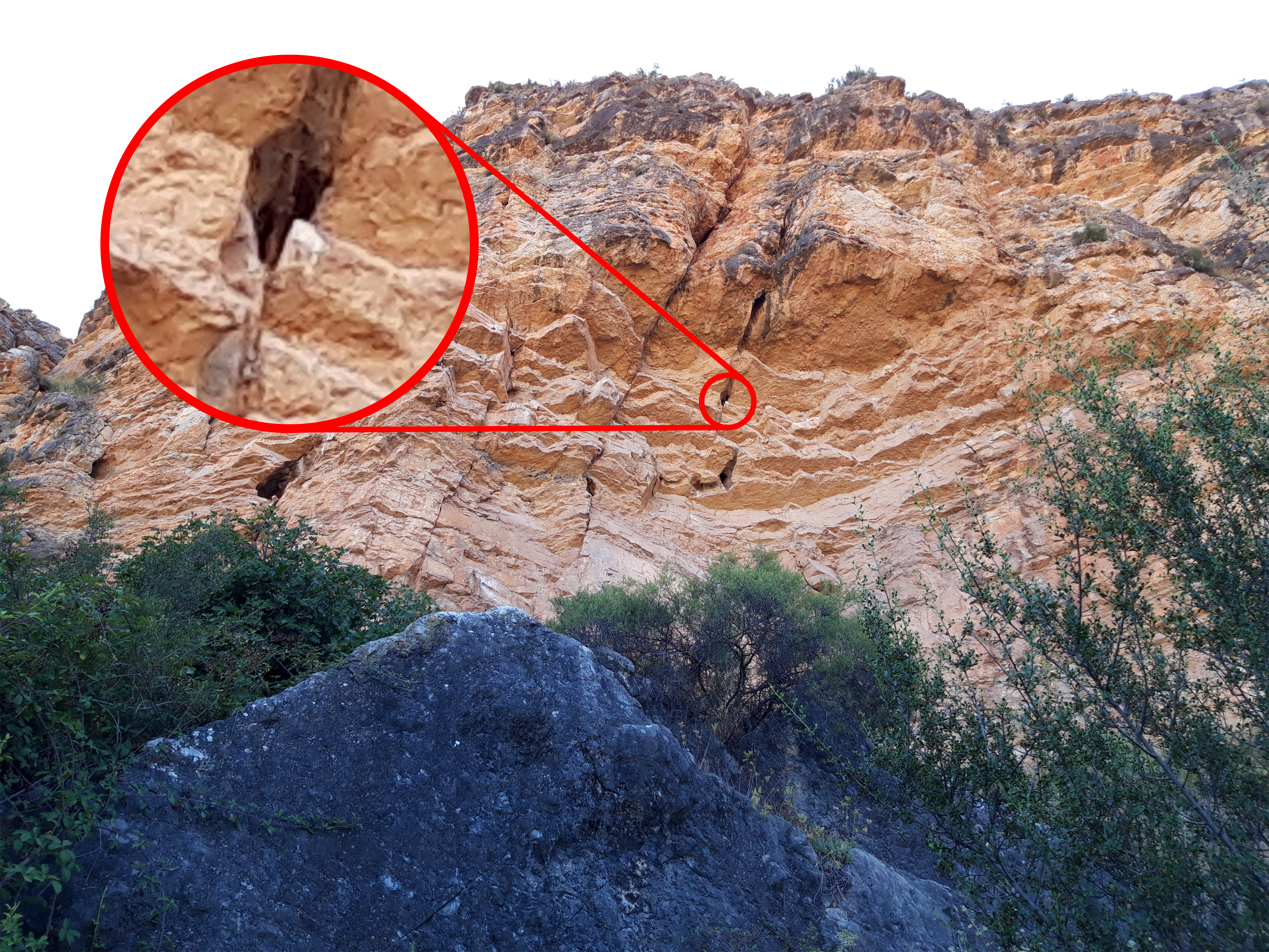 Aragonés: Palo del Moro (Ricla, detalle)